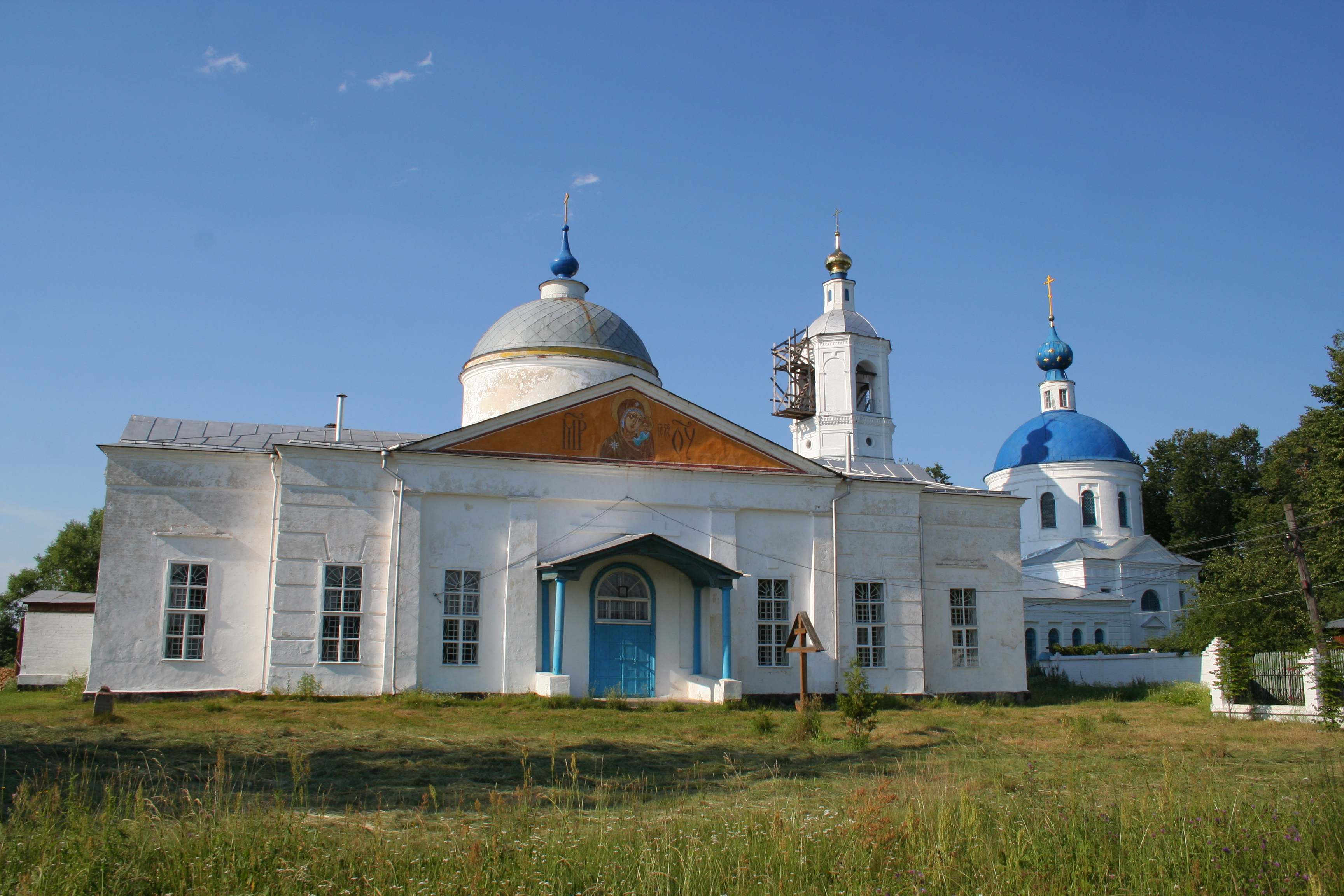 Kirche der Hl. Dreifaltigkeit (links), Glockenturm und Kreuzerhöhungskirche in Kosterjowo, Oblast Wladimir, Russland.